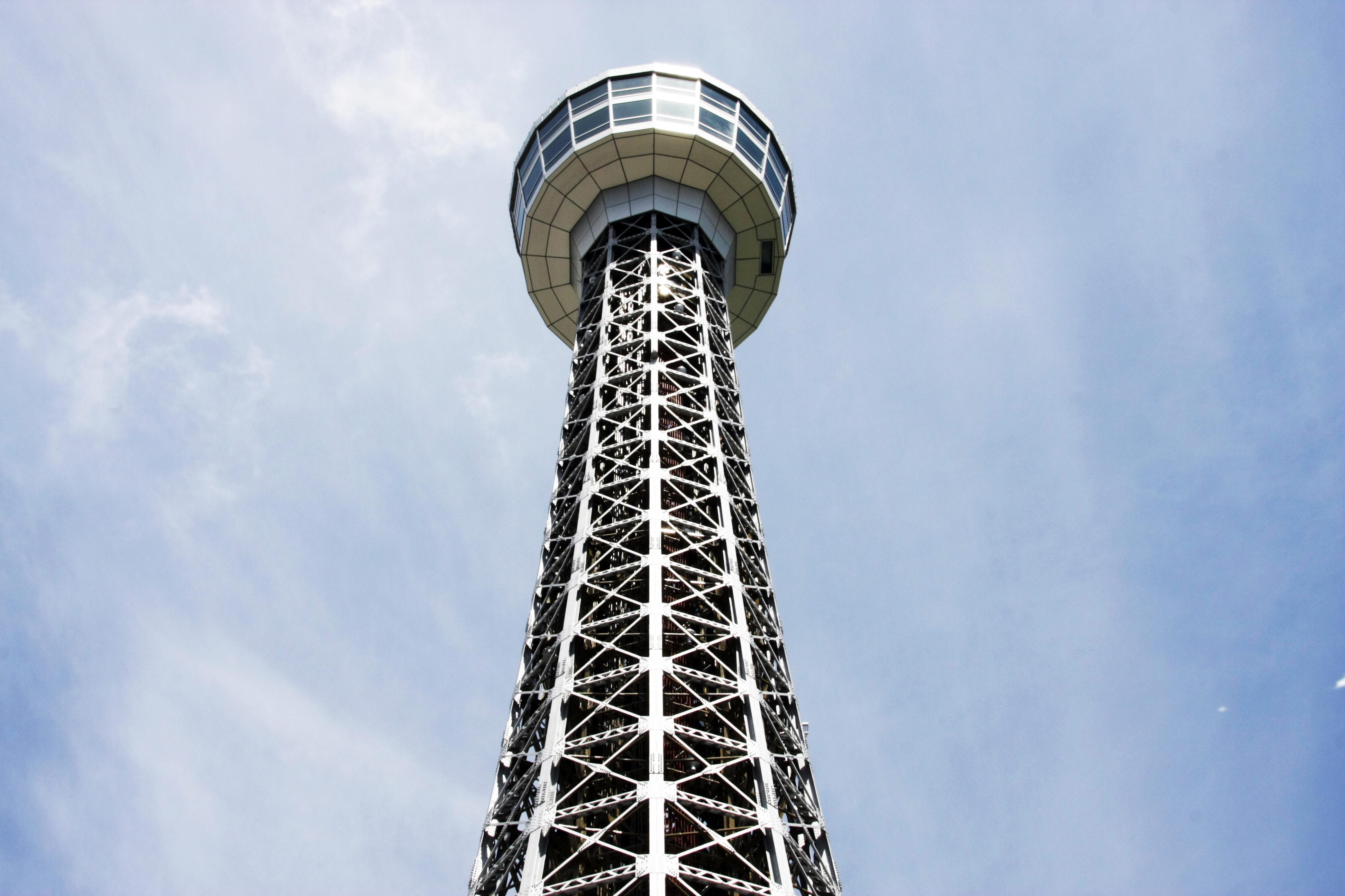 Marine Tower, Yokohama Japan